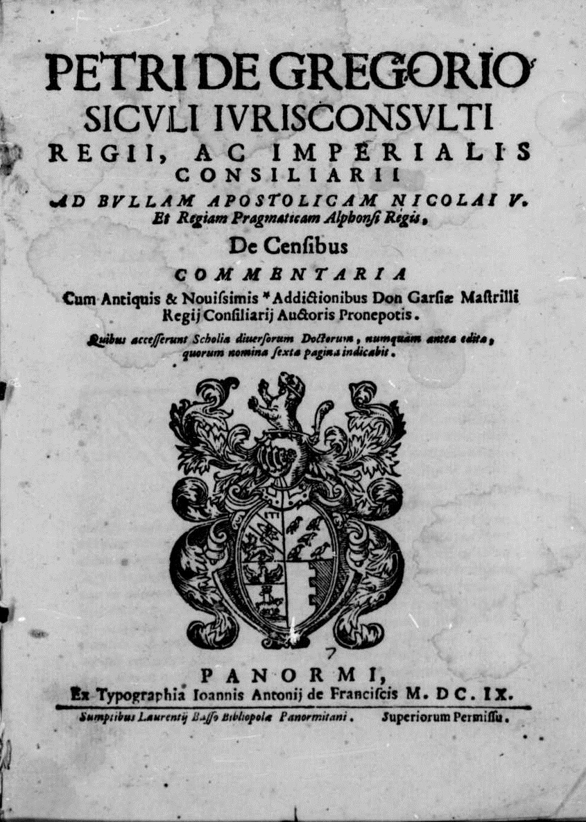 Frontespizio